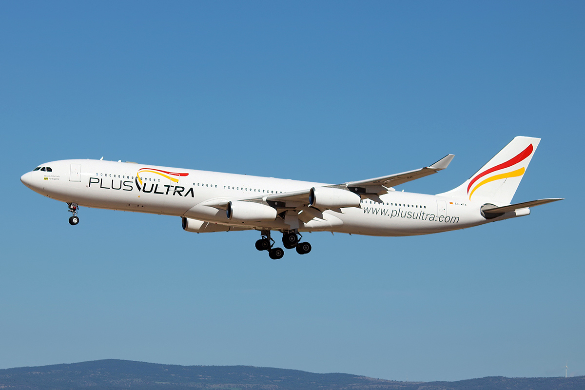 Reg: EC-MFA Aircraft: Airbus A340-313 Airline: Plus Ultra Líneas Aéreas Serial #: 212 at Teruel - LETL (Spain)